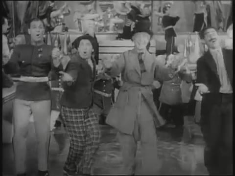 Imatges extretes del Tràiler de la pel·lícula "Duck Soup" -sopa d'ànec- dels Germans Marx.